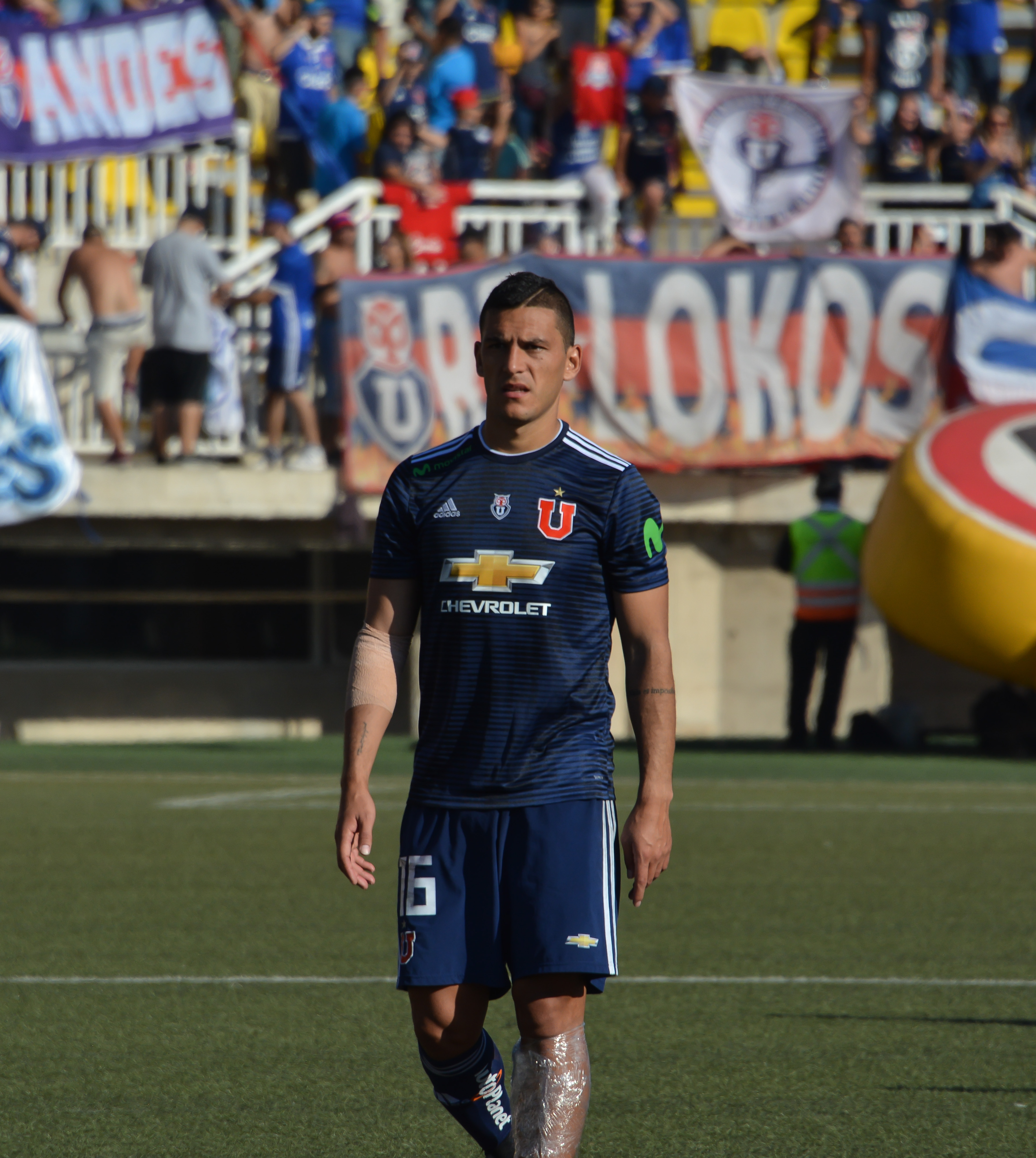 Unión La Calera v Universidad de Chile, Estadio Municipal Lucio Fariña Fernández, Quillota, Chile.